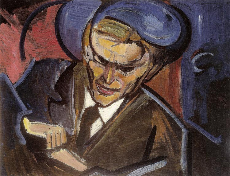 Portret Tytusa Czyżewskiego